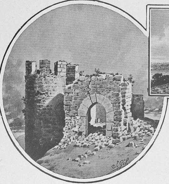 Atalaya del montecillo en Aranda de Duero, según dibujo del autor tomado del natural el año 1888.